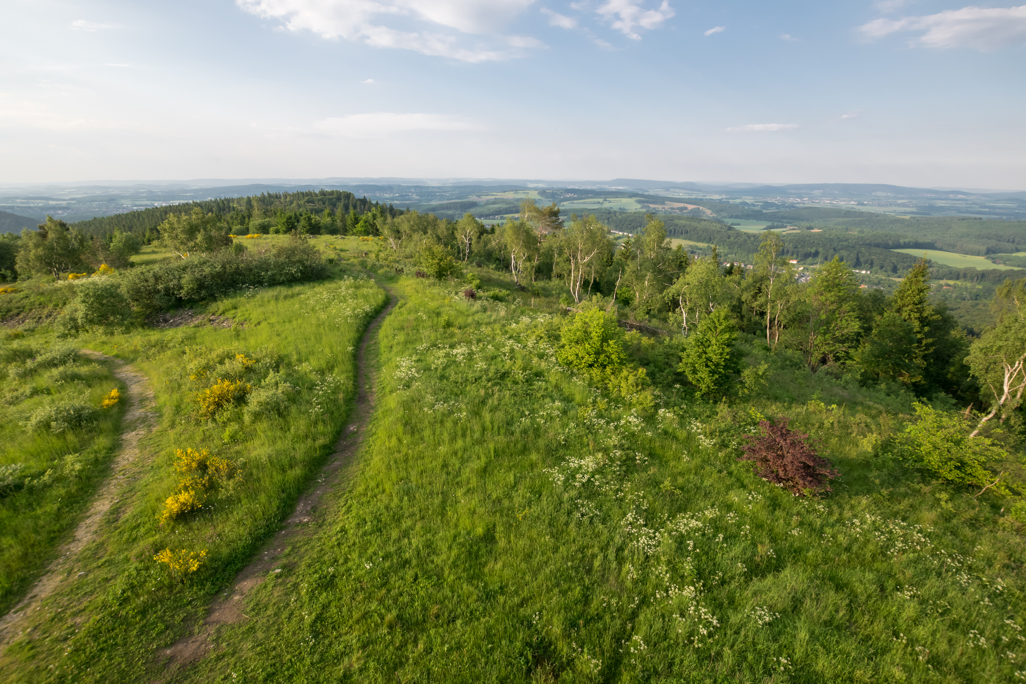 Aussicht vom Eggeturm auf der Preußlichen Velmerstot; Blick Richung Norden; links das Gebiet der Gemeinde Horn-Bad Meinberg, rechts Steinheim-Sandebeck